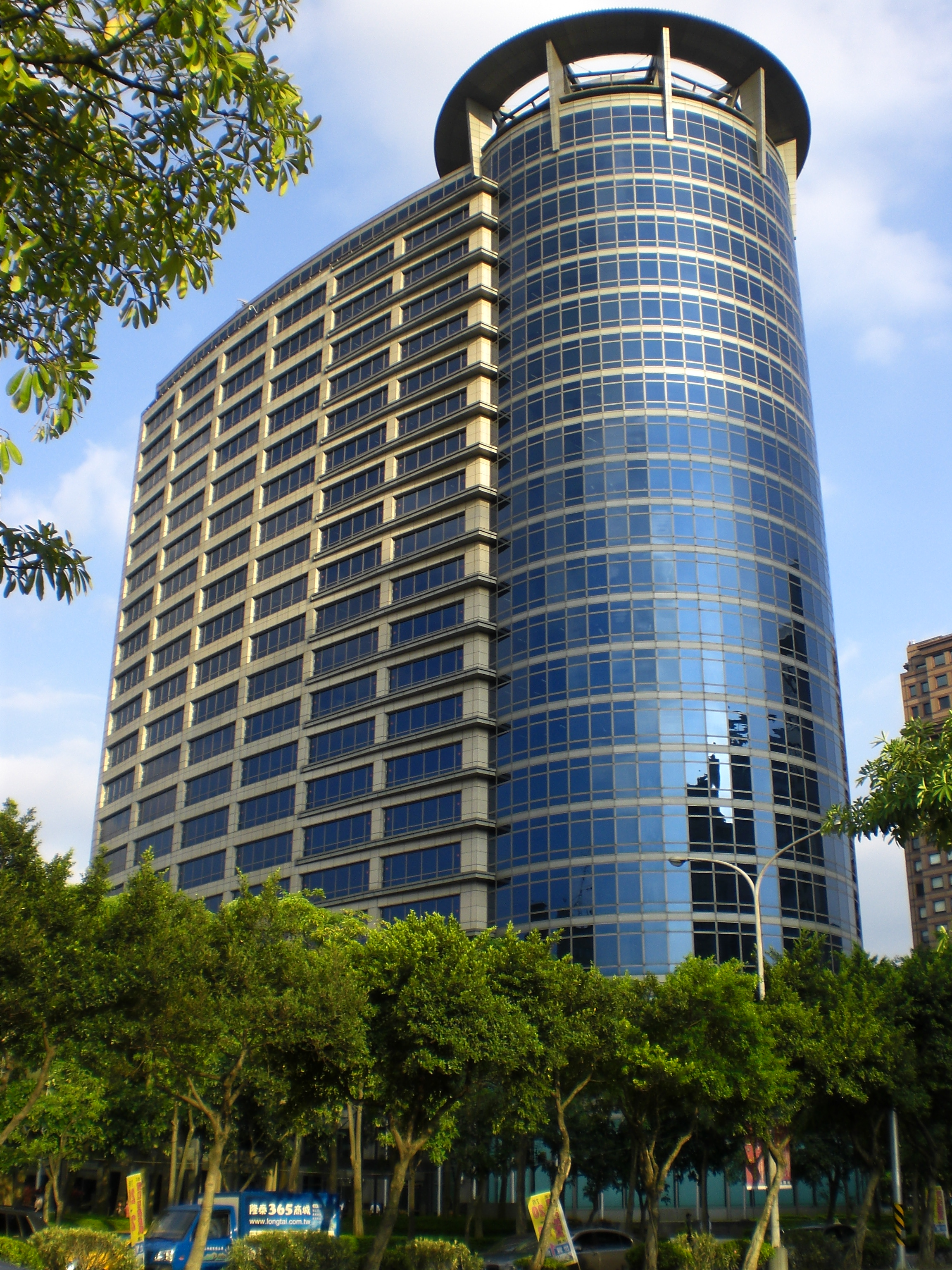 中文（台灣）: 中油大樓。